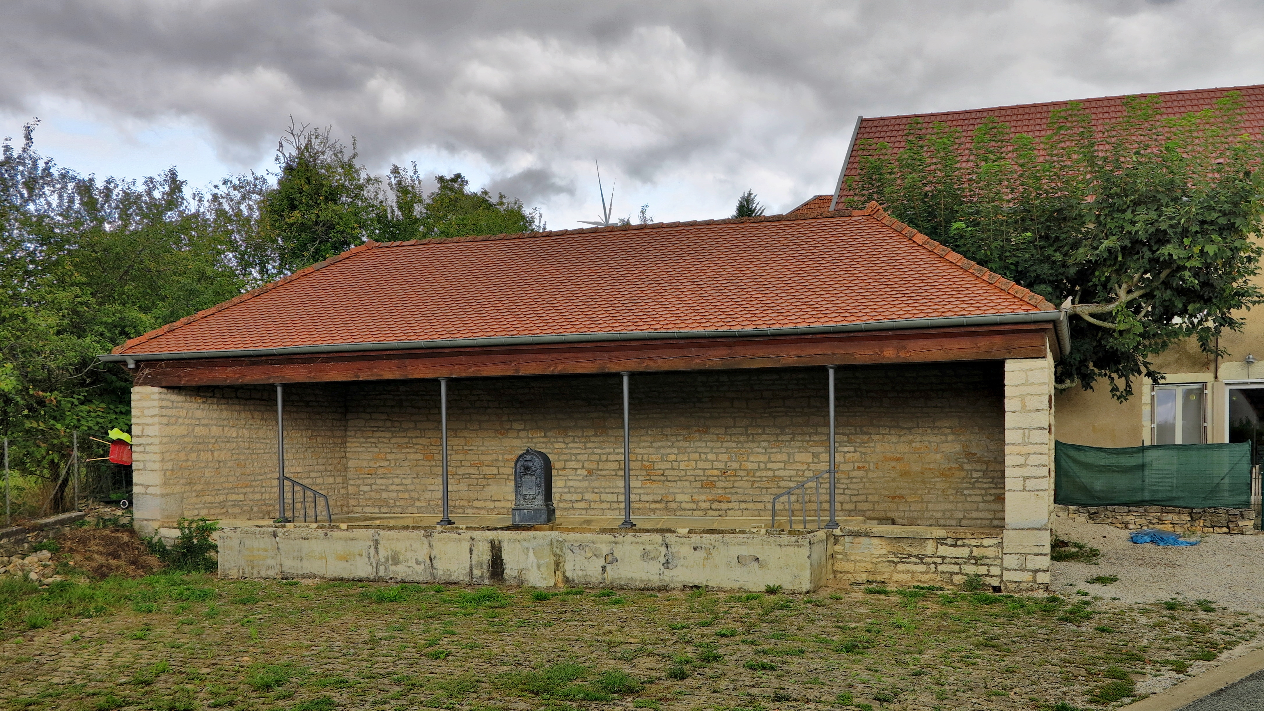 Le lavoir-abreuvoir